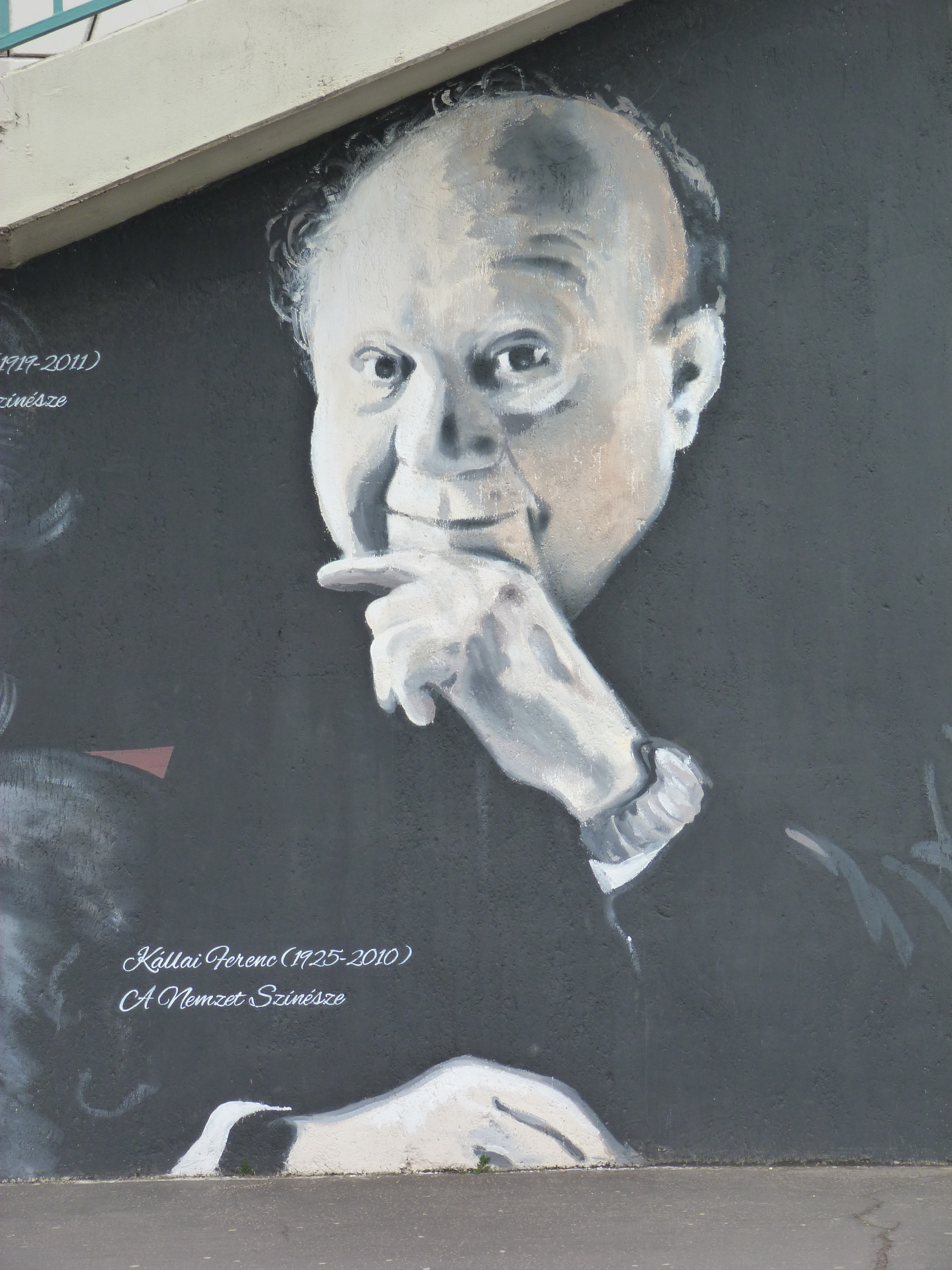 A felvétel 2012. december 3 -án, hétfőn készült Budapesten, a Rákóczi híd pesti hídfőjénél, a Nemzeti Szinháznál. Falkép (graffiti) a híd feljáróján. 2012. március 25 -én, a Nemzeti Színház megnyitásának 10. Évfordulóján adták át a nemzet színészeit ábrázoló falképet (graffiti) a Rákóczi híd pesti hídfőjénél. A Suppré-Neopaint csapat a Nemzet Színészeinek arcképeit festette meg: Agárdy Gábor, Bessenyei Ferenc, Komlós Juci, Kállai Ferenc, Garas Dezső, Lukács Margit, Sinkovits Imre, Zenthe Ferenc és Raksányi Gellért. A művelet a 2011 –ben útnak indított TűzfalRehab része, melynek keretében nagyméretű falfelületeket, tűzfalakat festenek le. A Nemzet Színészei: Koncepció, kivitelezés: Suppré-Neopaint Szakmai partner: Nemzeti Színház - A festéket biztosította: Trilak Festékgyártó Kft. 2012. Források: Cimkék: falkép graffiti suppré-neopaint Tűzfral/Rehab